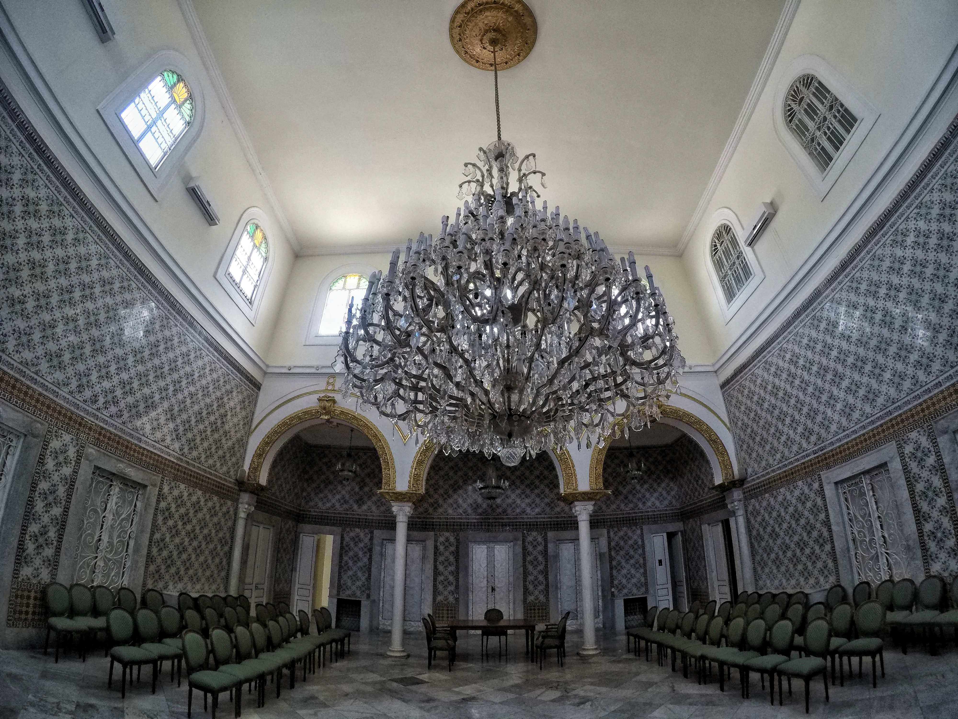 Partie historique dit « Kasr Essaâda » à La Marsa avec une zone de servitude étendue jusqu’à la clôture du palais conformément à l’article 45 du code du patrimoine